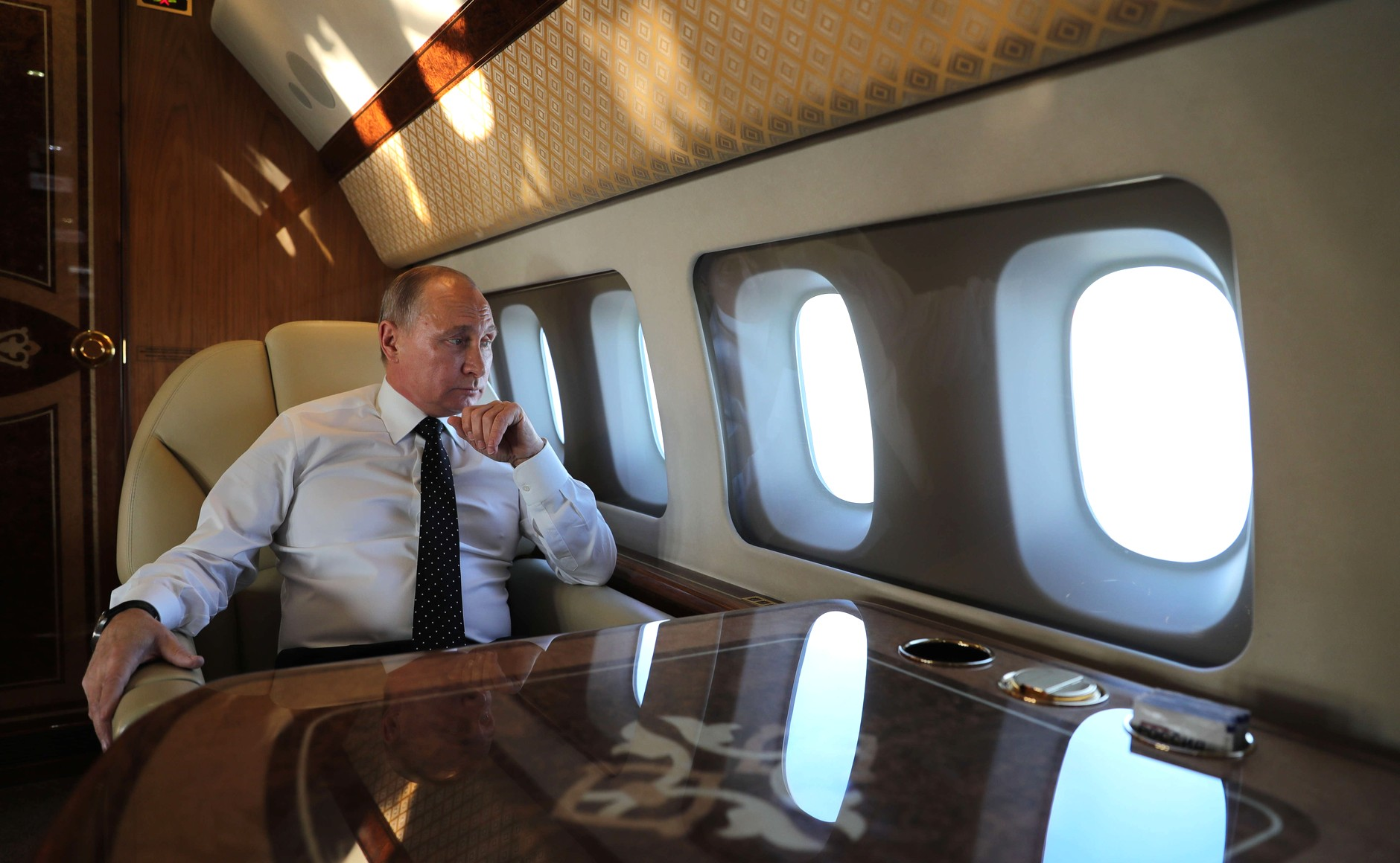 По пути на авиабазу Хмеймим в Сирии.